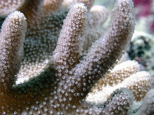 Sinularia polydactyla, vista de pólipos expandidos. Samoa Americana